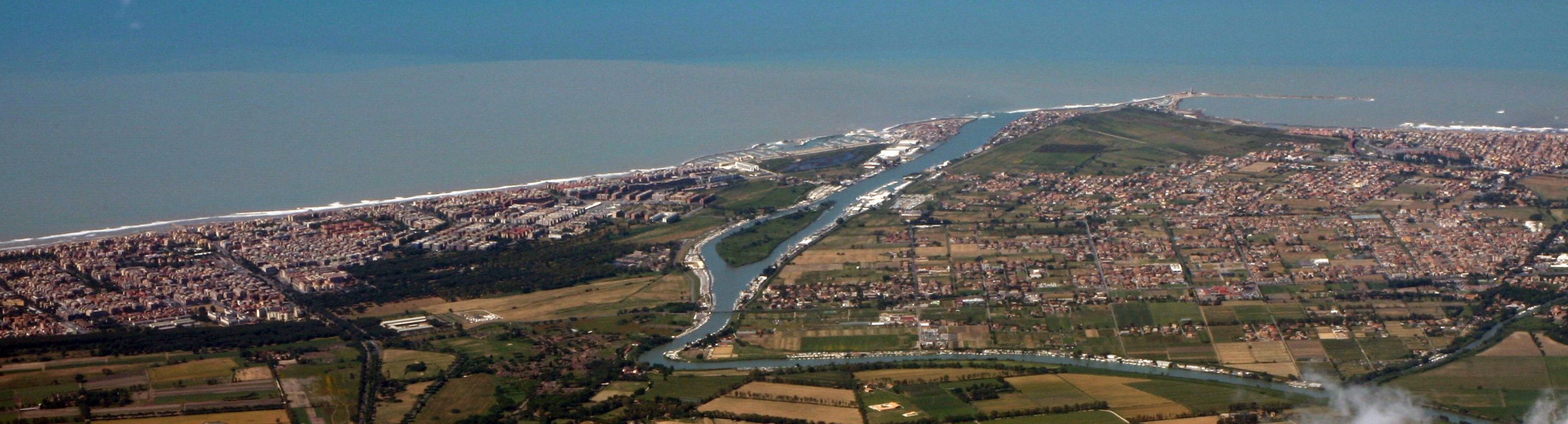 Comune di Fiumicino and the Tiber River, near Rome.